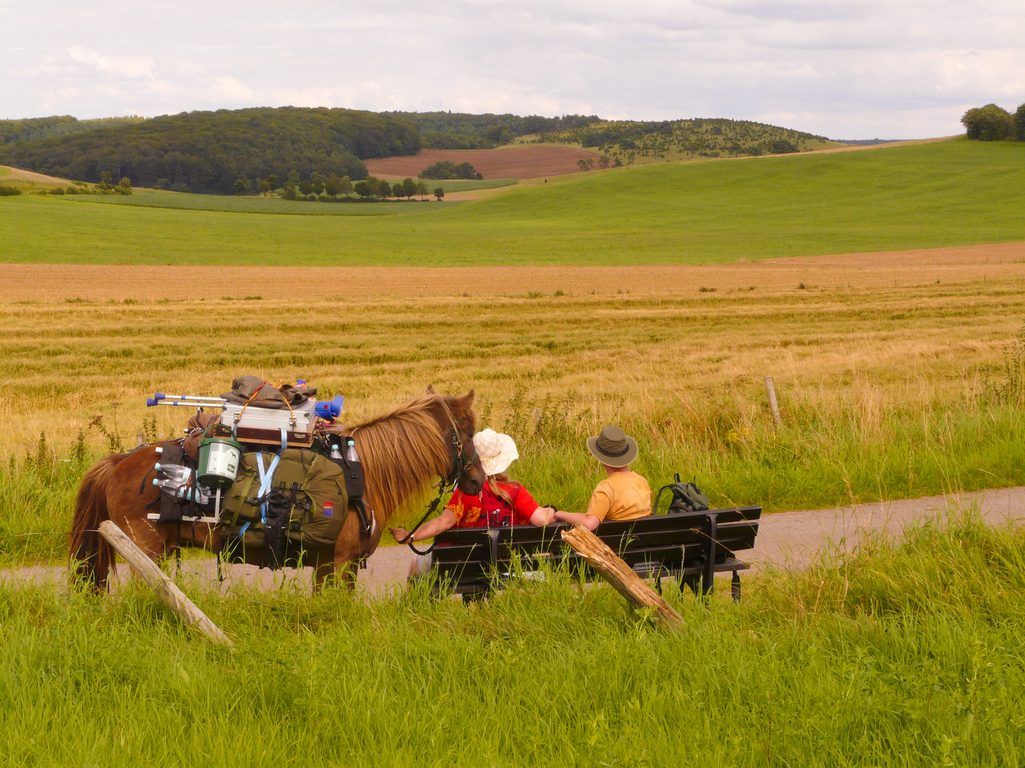 Blick über Wiesen und Felder auf (v.l.n.r.) die Naturschutzgebiete Lampertstal und Alendorfer Kalktriften und mit Fuhrbach und Mackental, Winterberg bei Wiesbaum und Baumberg bei Wiesbaum